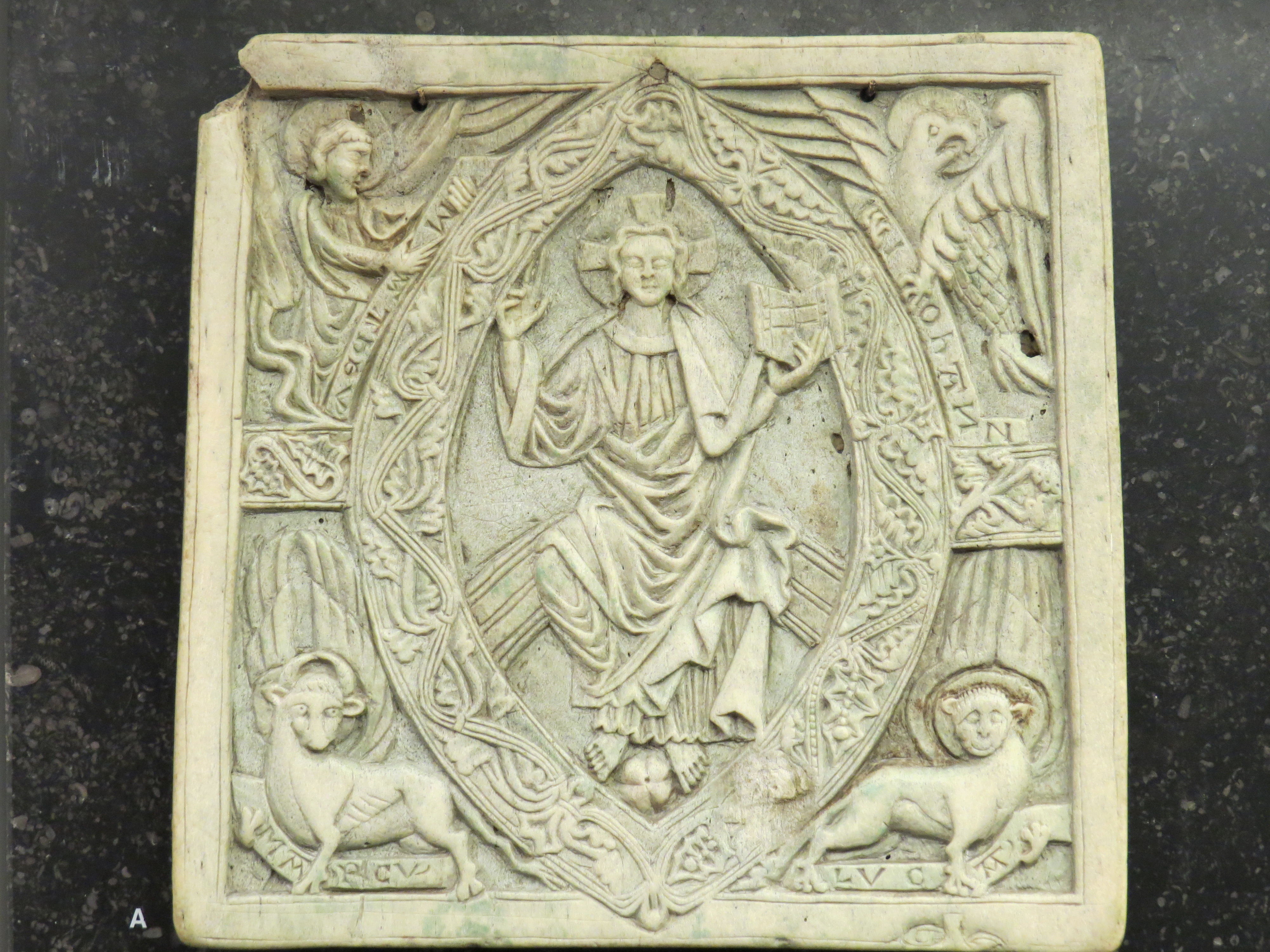 Reliefplade i hvalben med rester af forgyldning, fra Norge, ca. 1250, Nationalmuséet i København